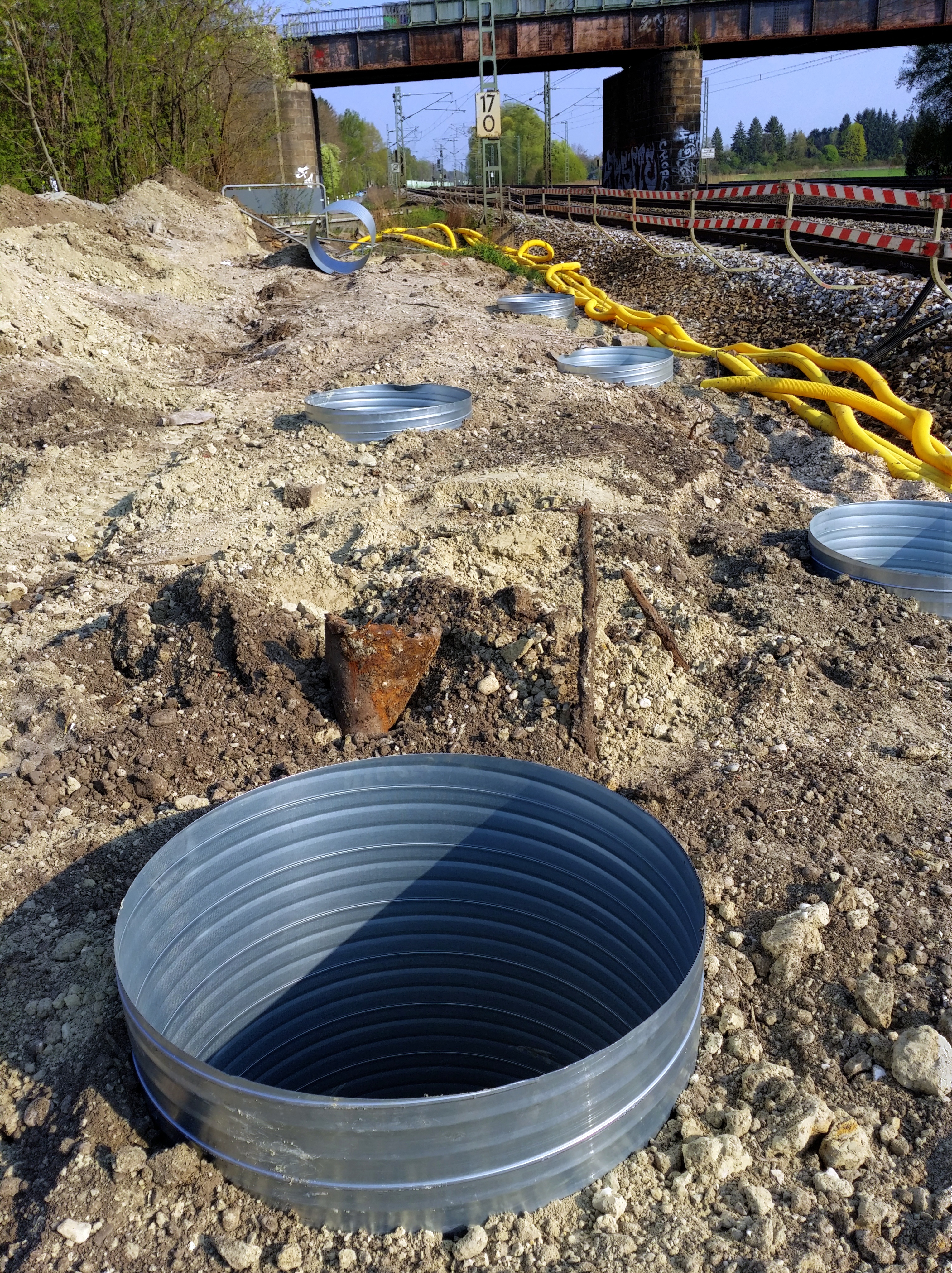 Vorbereitung für die Fundamente der Halteträger für eine Lärmschutzwand zwischen Gröbenzell und Olching